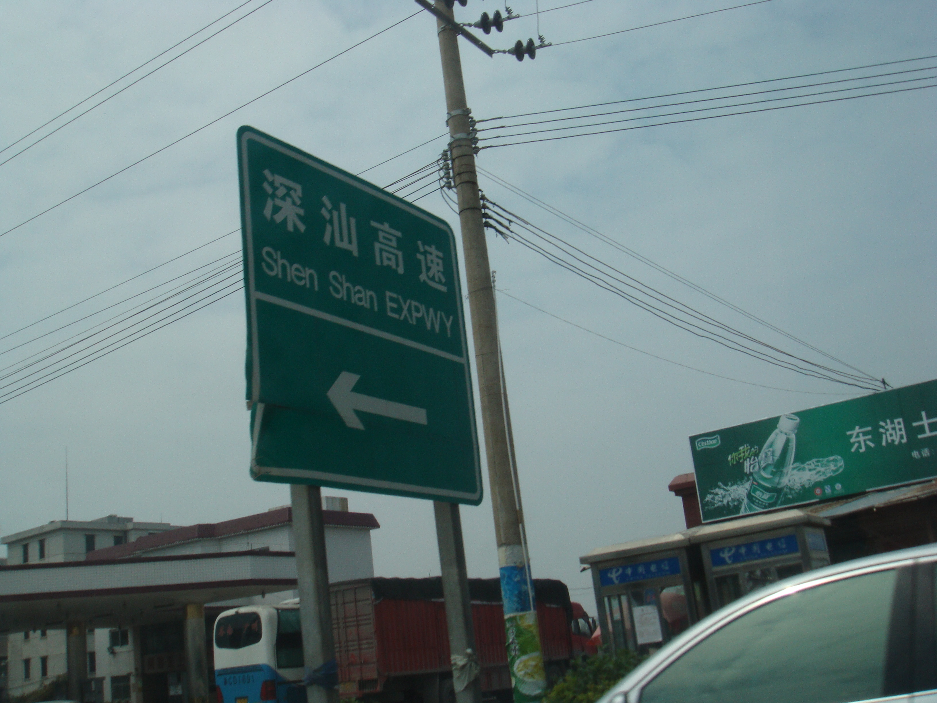 深汕高速陸豐入口